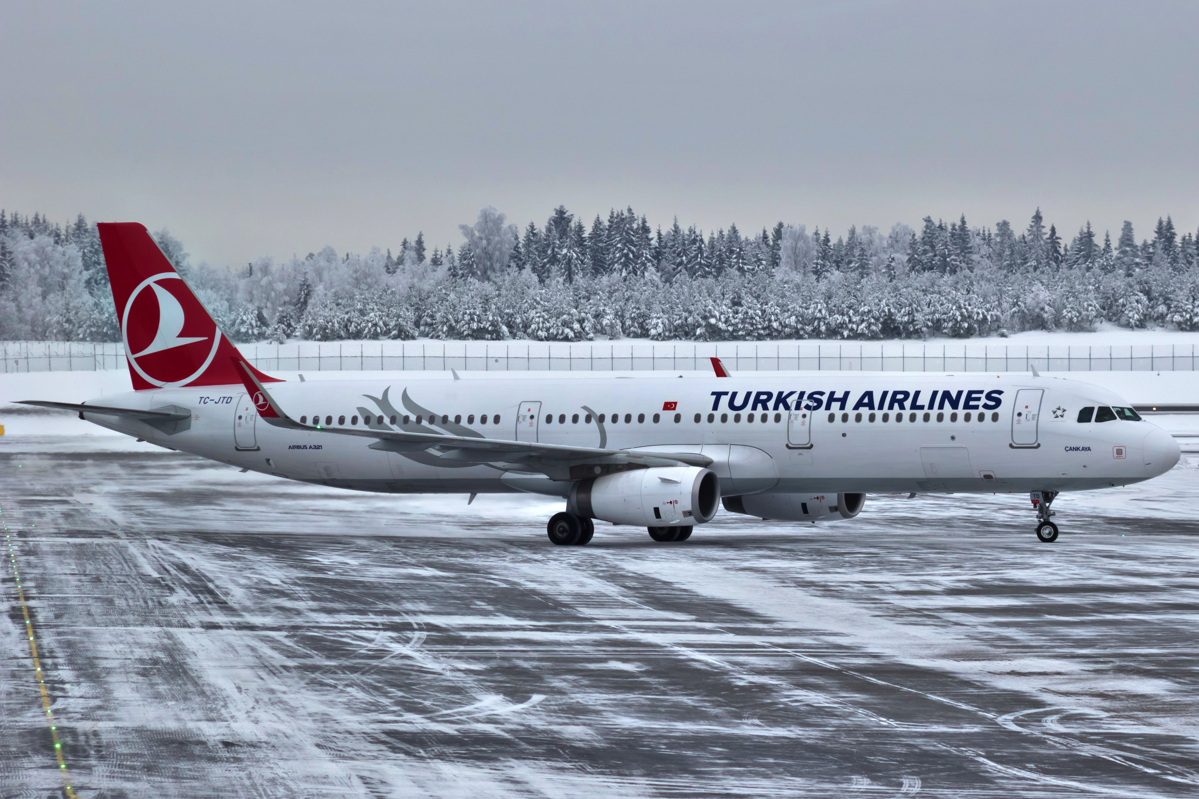 Airbus A321 de Turkish no aeroporto de Oslo-Gardermoen.